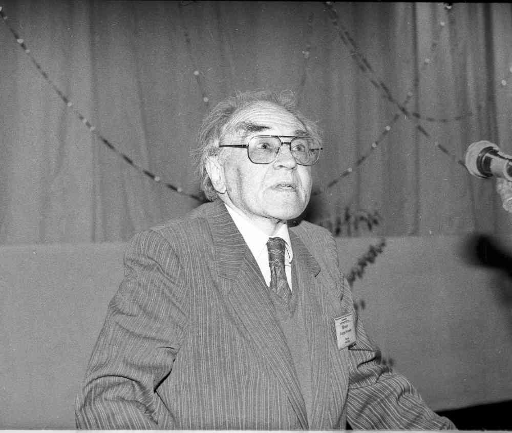 Академик Российской академии образования историк Сигурд Оттович Шмидт выступает на конференции «Малые города России». Переславль, улица Свободы, дом 46, кинотеатр «Восток».